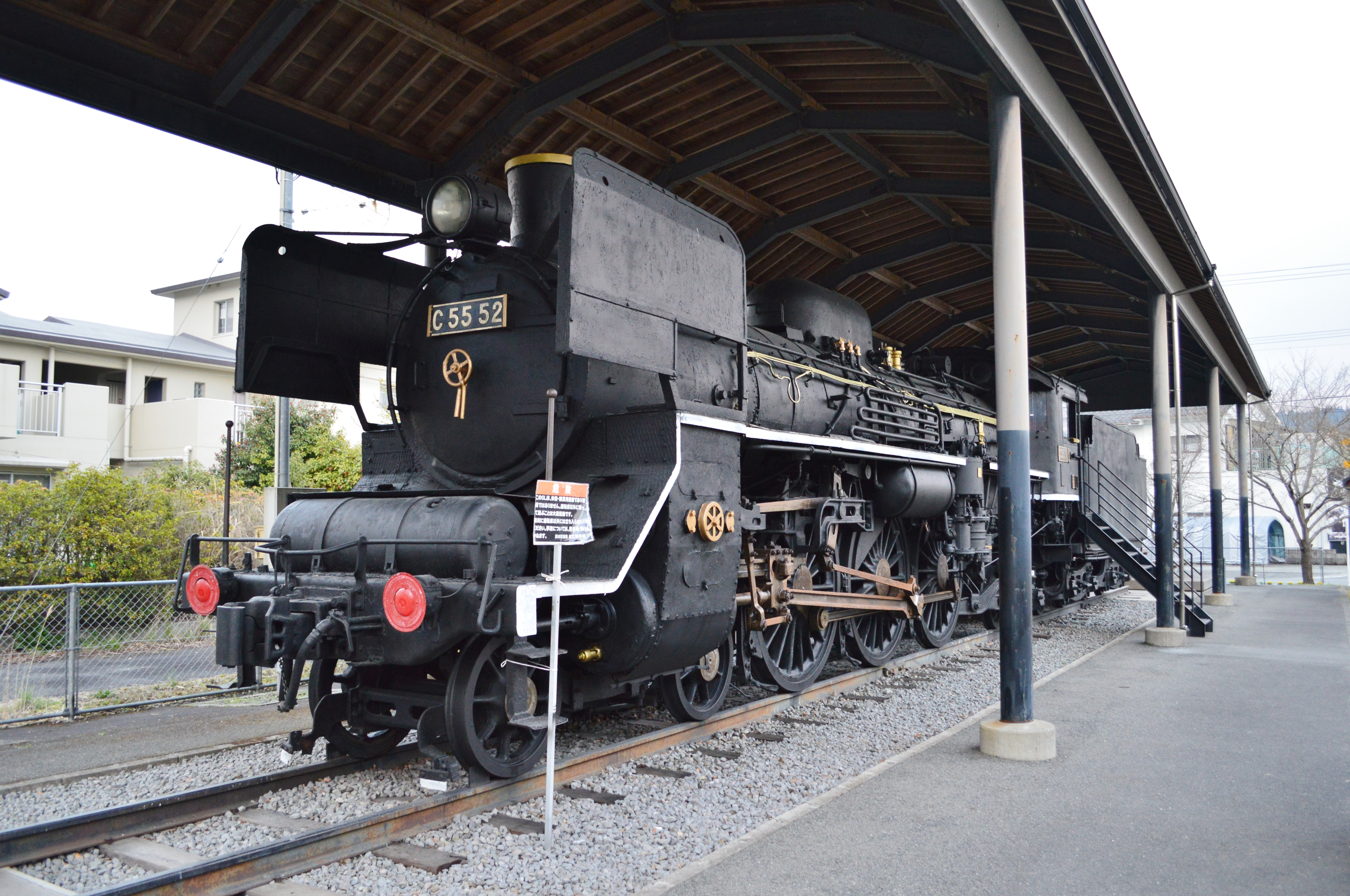 C55 52 (吉松駅にて)